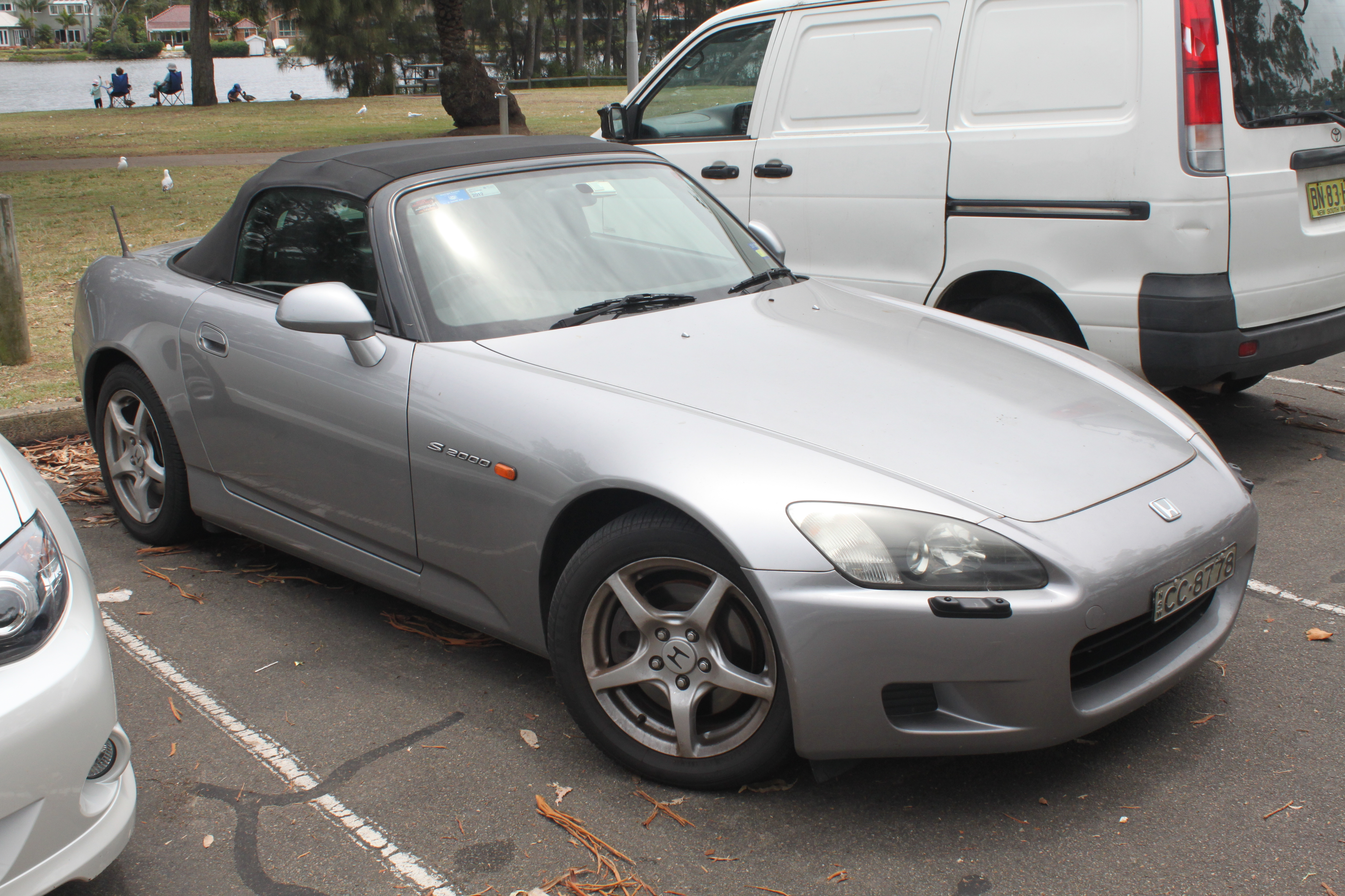 Honda S2000